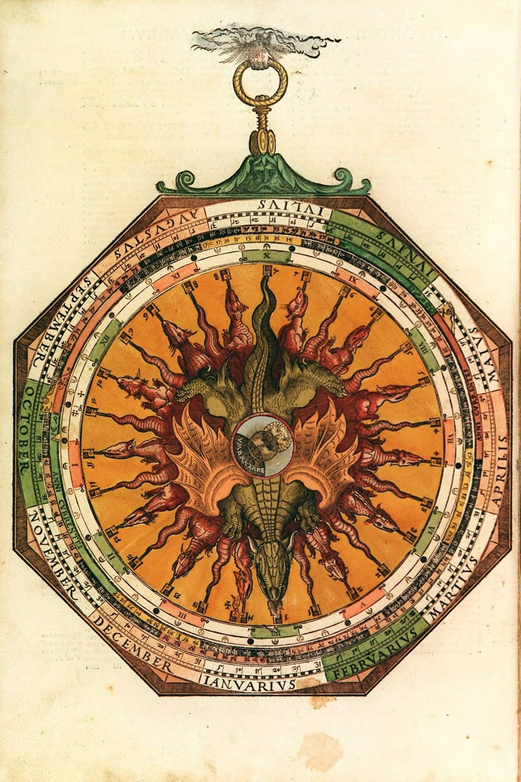 Illustration de Astronomicum Caesareum : Disque mobile donnant les règles pour prédire les éclipses du soleil et de la lune. Un des disques porte un dragon à multiples têtes et une éclipse partielle du soleil